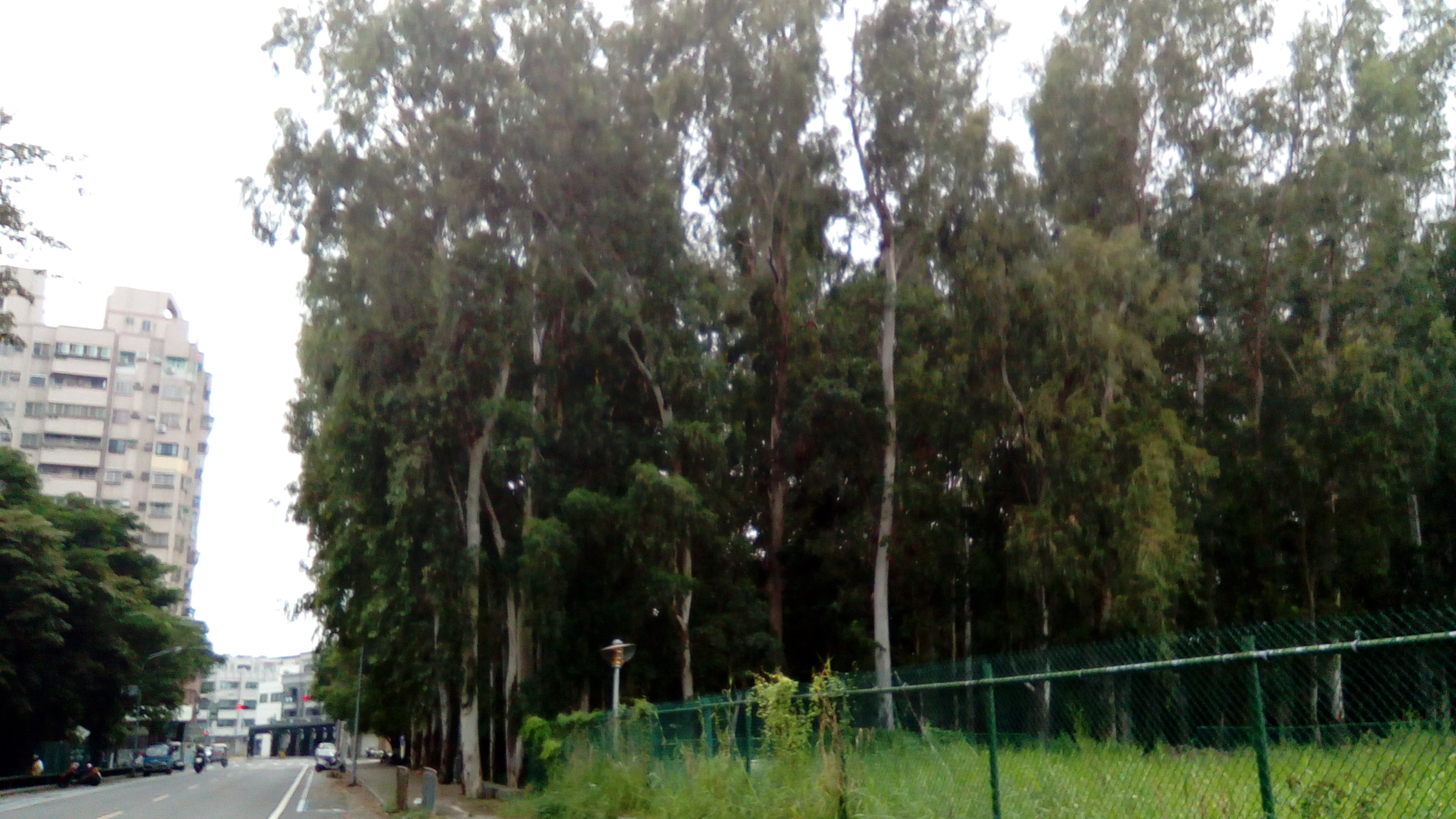 位於永華路上 探索公園旁